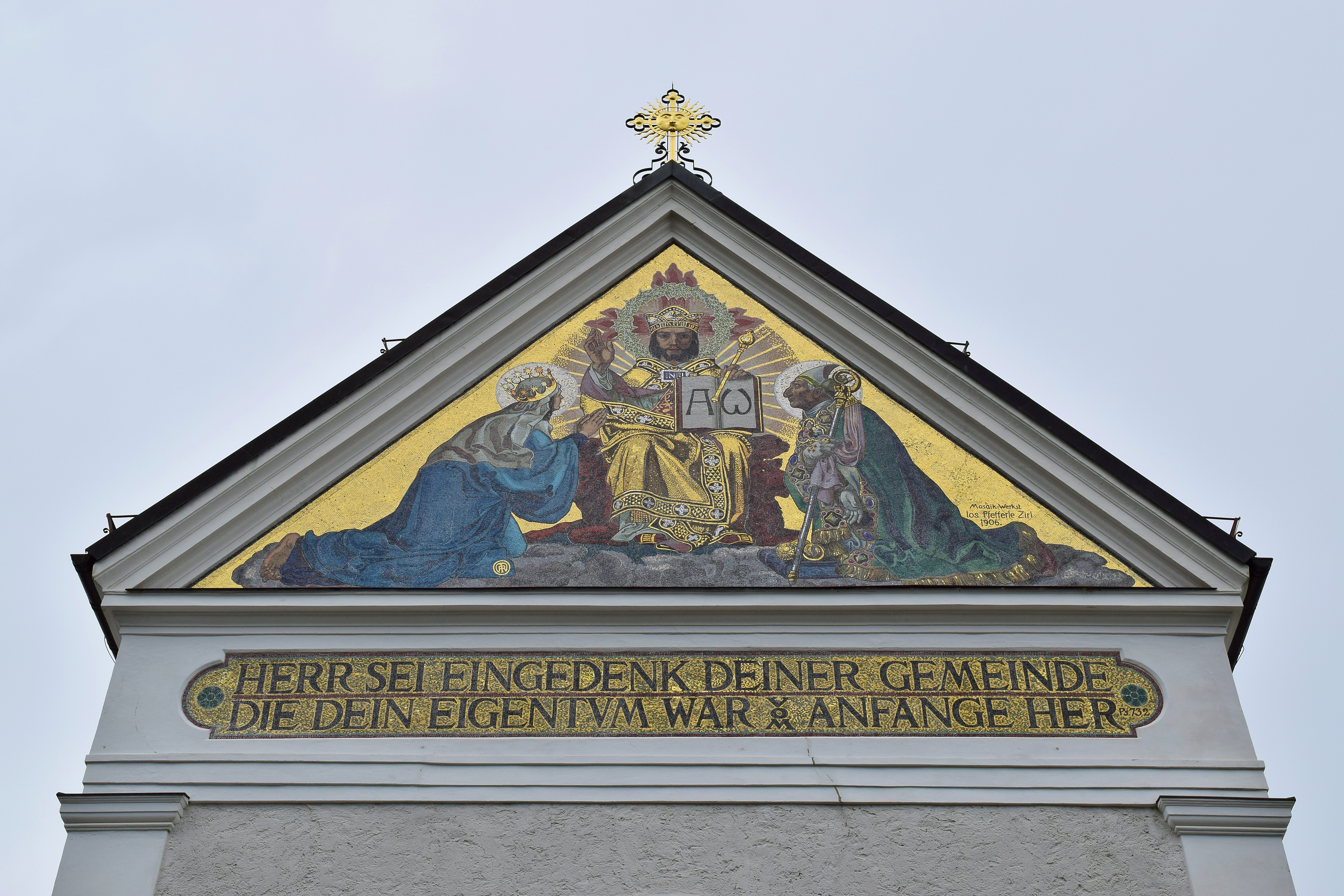 Die Pfarrkirche St. Nikolaus in Reith bei Seefeld wurde 1895 errichtet. Nach Kriegsschäden wurde sie 1950 wiederhergestellt und 1989/90 in den Stand von 1911–1921 versetzt.